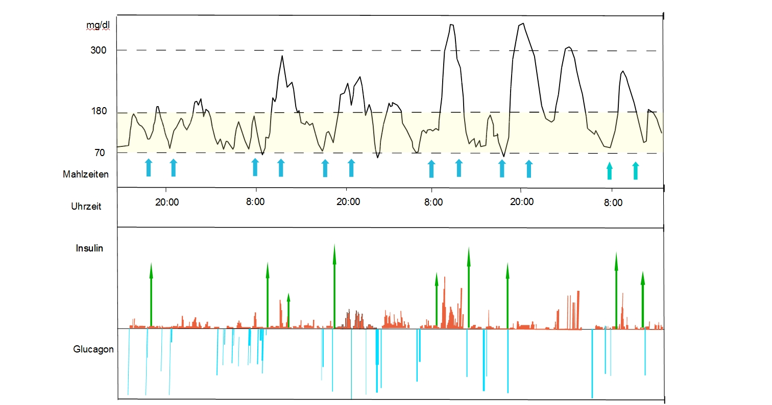 Glucoseprofil eines Typ-1-Diabetikers ueber drei Tage, welches mittels bihormonalem kuenstlichem Pankreas entstanden